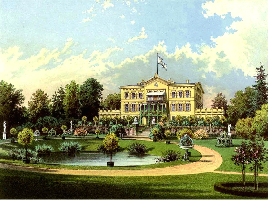 Rittergut Langheinersdorf, Kreis Züllichau-Schwiebus, Provinz Brandenburg